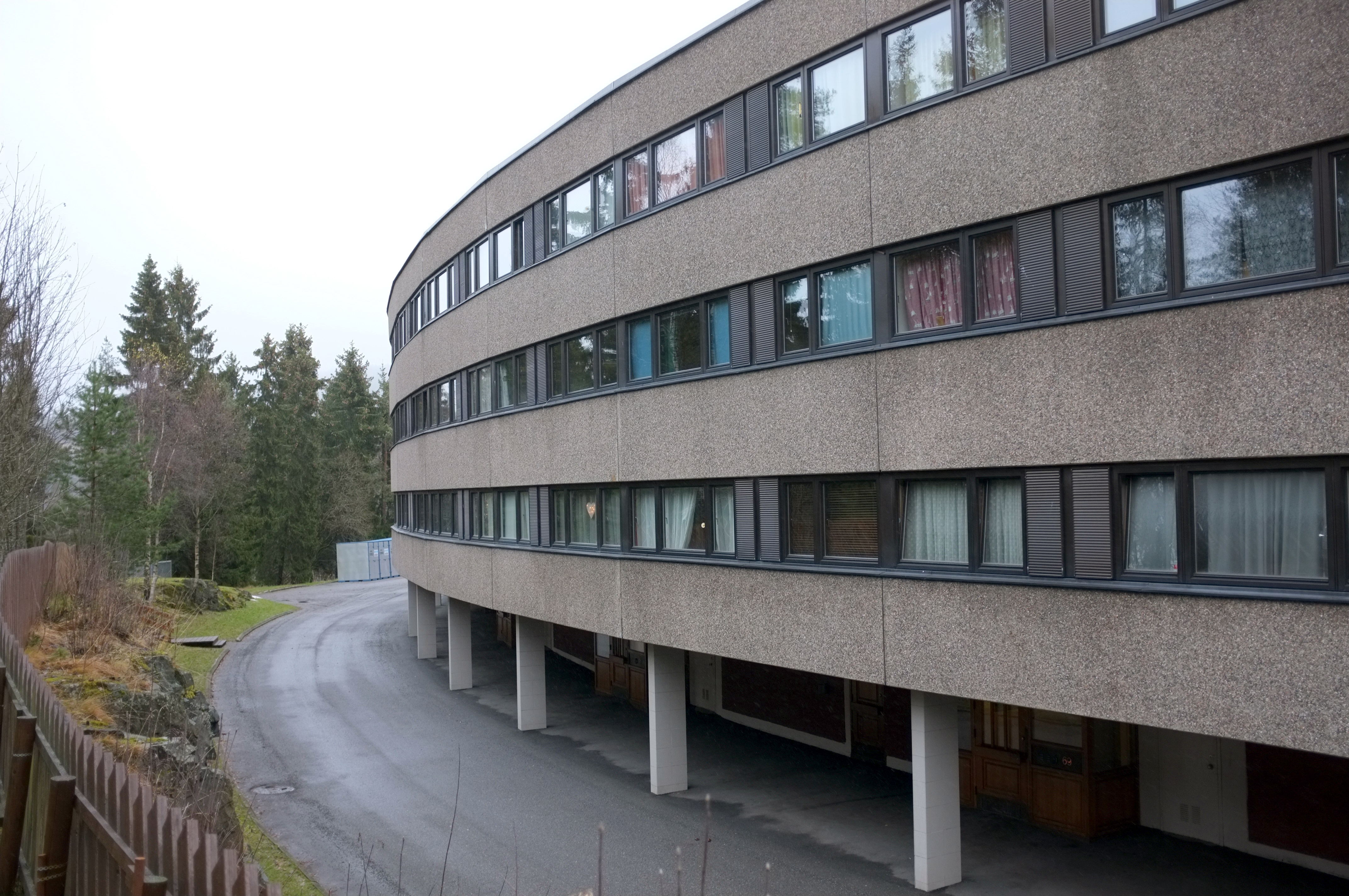 "Bananblokka", Ammerudveien 51-91. Arkitekt Håkon Mjelva.